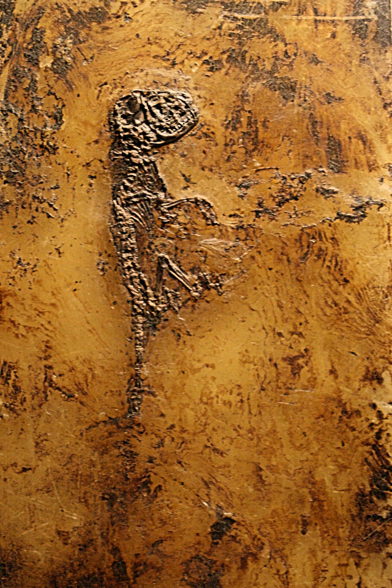 Fossile kleine Beutelratte ("Peradectes" sp.). Sonderausstellung «Messel, Urpferd & Co.» im Naturhistorischen Museum Basel